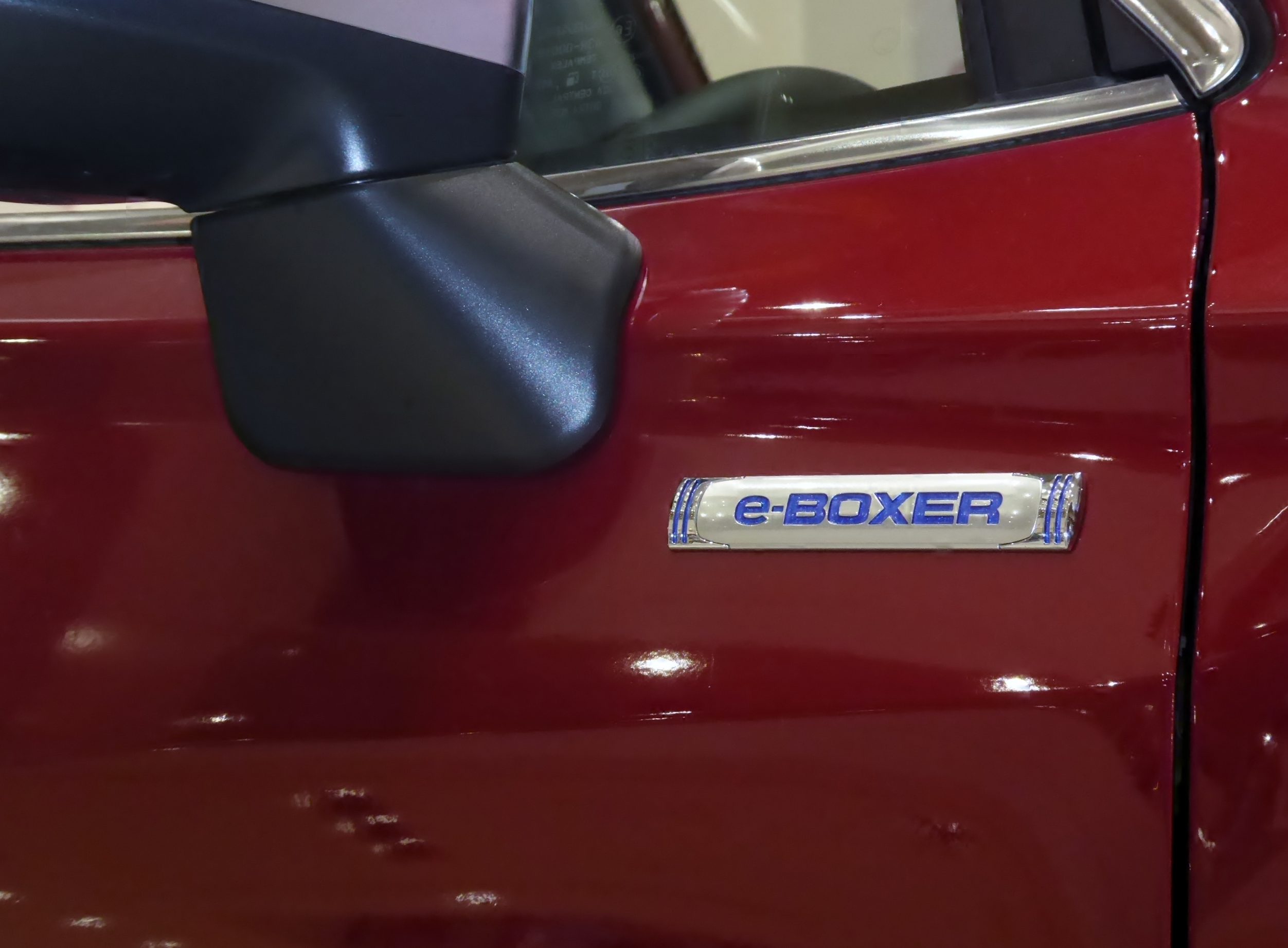 5AA-SKE型スバル・フォレスターAdvanceに装着されている"e-BOXER"バッジを撮影。